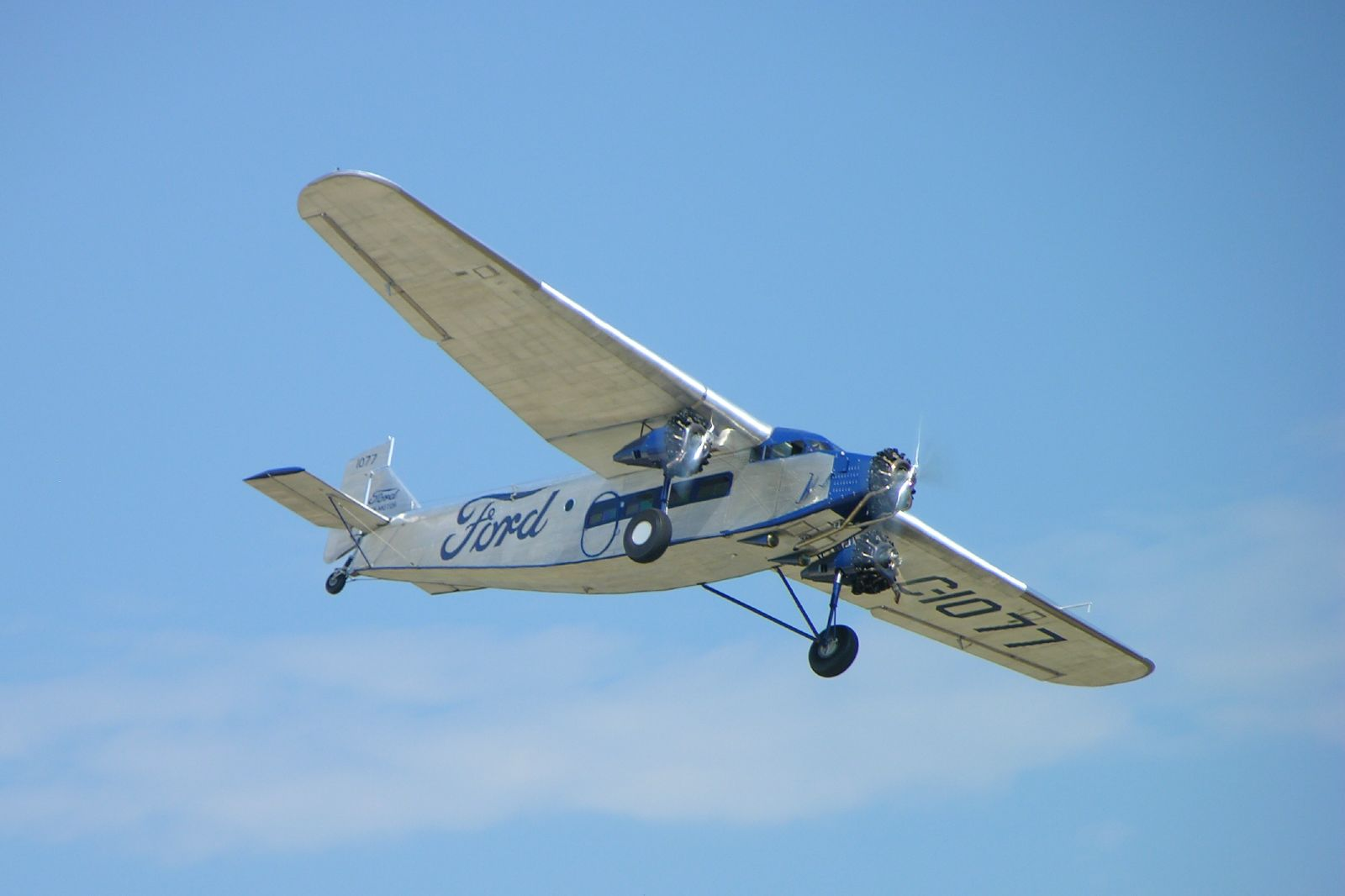 Airventure 2005